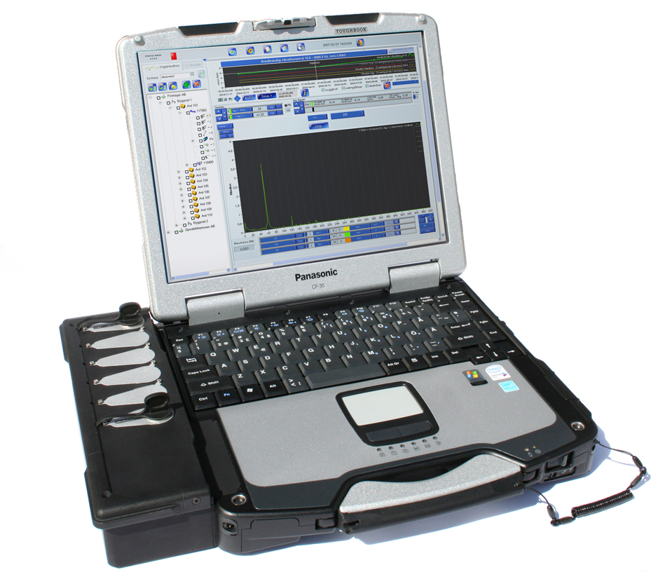 SEMA-601 Maskinhälsoanalysator